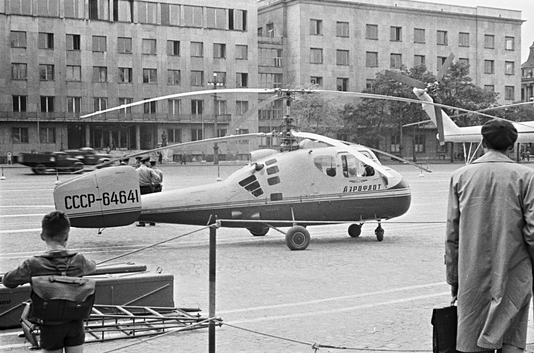 Ötvenhatosok tere (Felvonulási tér), Budapesti Ipari Vásár. Kamov Ka-18 típusú helikopter. Location: Hungary, Budapest XIV. Tags: Kamov-brand, Soviet brand, Budapest, Cyrillic alphabet Title: Ötvenhatosok tere (Felvonulási tér), Budapesti Ipari Vásár. Kamov Ka-18 típusú helikopter.